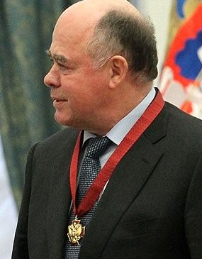 Ректор Московского педагогического государственного университета Виктор Матросов на награждении орденом «За заслуги перед Отечеством» III степени